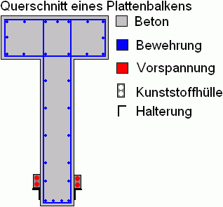 Schema einer externen Vorspannung